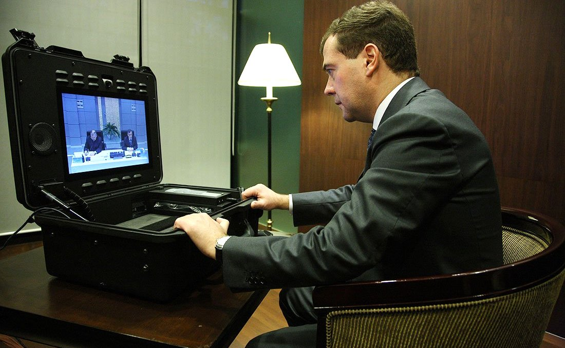 Во время видеосвязи с ситуационным центром МЧС. Министр внутренних дел Рашид Нургалиев и первый заместитель главы МЧС Руслан Цаликов доложили Президенту о мерах по ликвидации последствий происшествия на складе боеприпасов в Ульяновске. English translation via Google Translate: During a video conference with the Emergency Situation Centre. Interior Minister Rashid Nurgaliyev and the first deputy head of the MOE Ruslan Tsalikov reported to the President on measures to eliminate the consequences of an accident at an ammunition depot in Ulyanovsk.